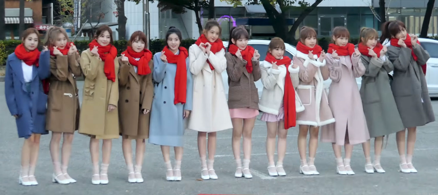 11월 2일 오전 서울시 영등포구 여의도 KBS 신관 공개홀에 KBS ‘뮤직뱅크(MUSICBANK)’ 리허설을 위해 아이돌이 출근을 하고 있다.